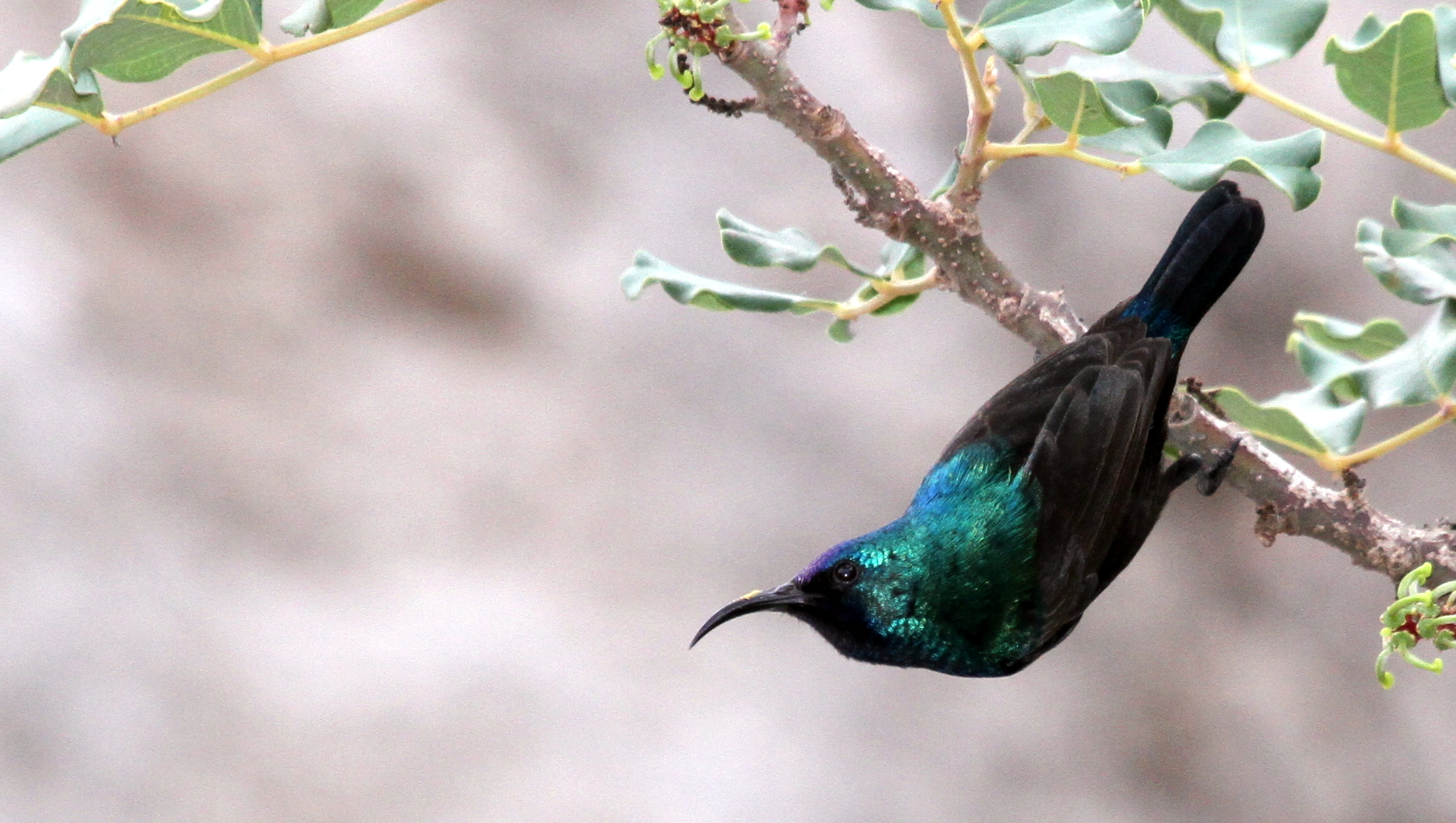 Palestine sunbird Israel